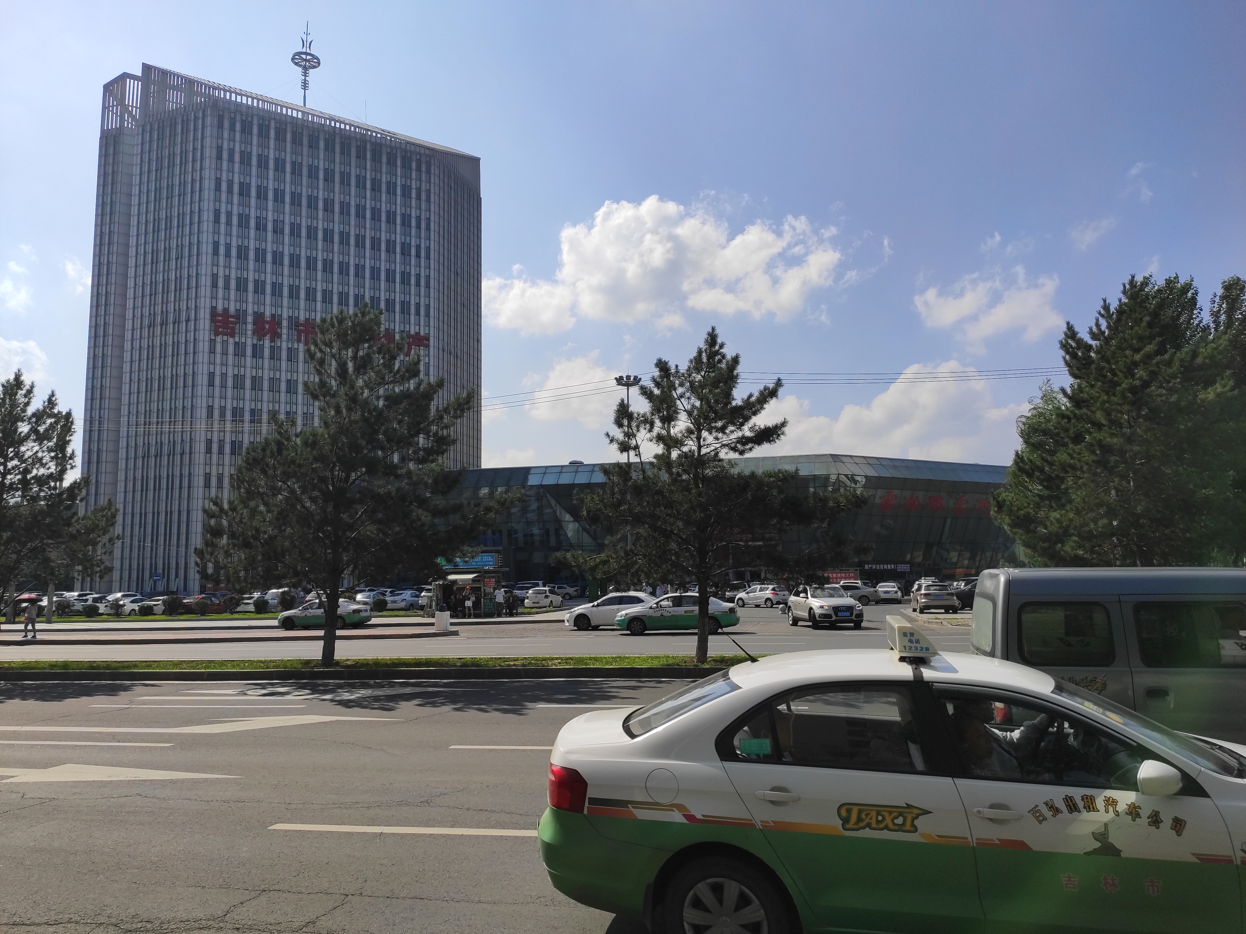 原吉林市雾凇路客运站，现在作为吉林市房地产交易中心使用